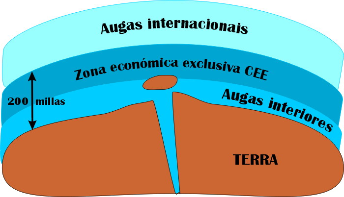 Mar. Augas interiores. Augas internacionais. Zona económica exclusiva CEE. 200 millas. Publish by= Luis Miguel Bugallo Sánchez. Self made